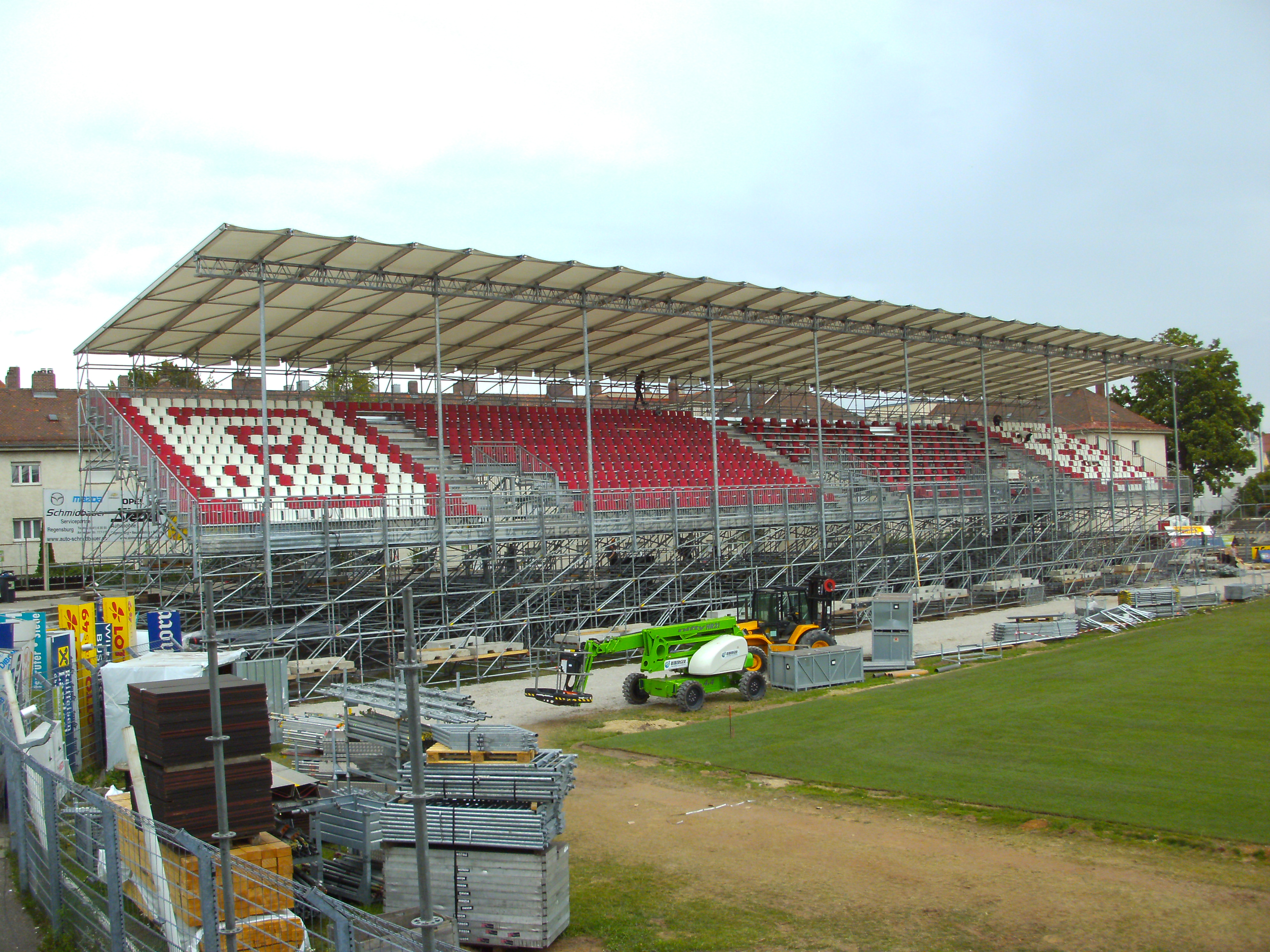 Bau der Nordtribüne in der ehemaligen Kurve in der Prüfeninger Straße im Sommer 2012.